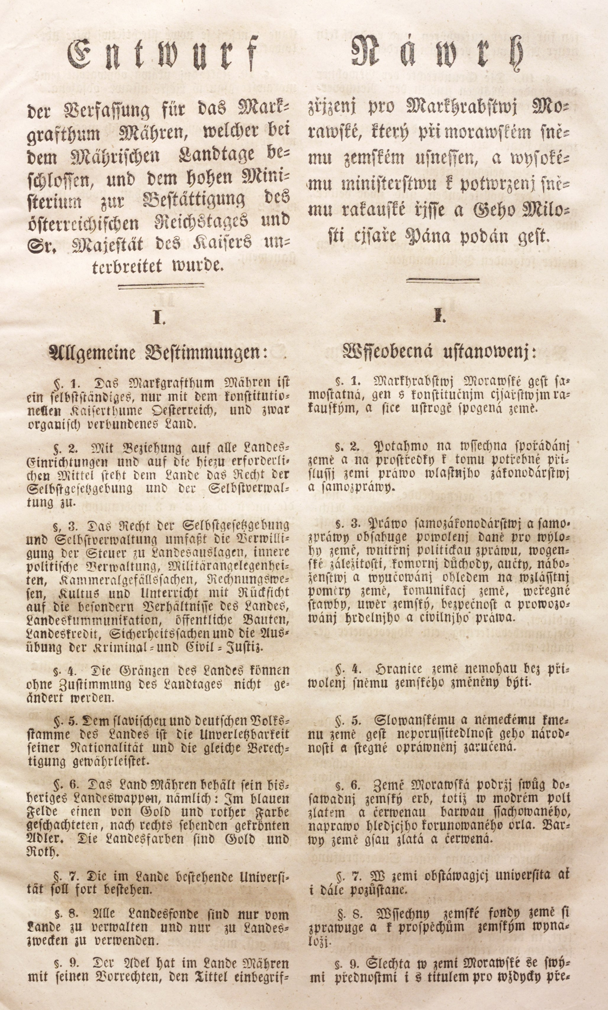 Návrh zřízení pro Markrabství moravské přijatý na tzv. selském sněmu v září 1848. (§ 6): "Země Moravská podrží svůj dosavadní zemský erb, totiž: V modrém poli zlatem a červenou barvou šachovaného, korunovaného, napravo hledícího orla. Zemské barvy jsou zlatá a červená.". Návrh nebyl realizován - zůstal v podobě nepřijatého legislativního návrhu. Píše o moravských barvách, nikoliv ale konkrétně o vlajce nebo praporu. Ze zápisu jednání sněmu v Moravském sněmovním listu vyplývá, že se nejednalo o podobu zemské vlajky, ale pouze o barvy moravské orlice na modrém štítu. Entwurf der Verfassung für das Markgrafthum Mähren, welcher bei dem Mährischen Landtage beschlossen, und dem hohen Ministerium zur Bestättigung des österreichischen Reichstages und Sr. Majestät des Kaisers unterbreitet wurde. Návrh zřízení pro Markrabství moravské, který při moravském sněmu zemském usnesen, a vysokému ministerstvu k potvrzení sněmu rakouské říše a jeho milosti císaře pána podán jest.